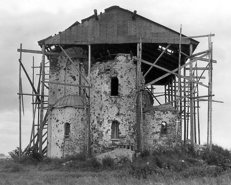 Руины церкви Спаса Нередицы с защитным шатром. Фото 1947 года